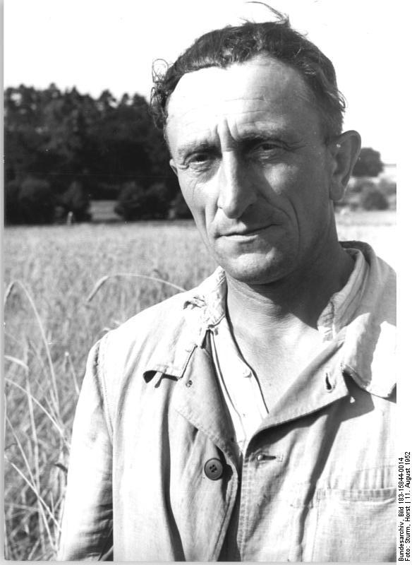 Worin, Bürgermeister, LPG-Vorsitzender ADN-ZB Sturm 11.8.1952 Durch die Bodenreform, die den Landarbeitern, Umsiedlern und landarmen Bauern Land gab, wurde für die werktätigen Bauern in der DDR der Weg frei zu einem besseren Leben. Die Regierung der DDR fördert und unterstützt weitgehend die Entwicklung der Landwirtschaft und die Verbesserung der Lage der werktätigen Bauern durch die MAS, durch Zuteilung von Krediten und die Zuteilung von hochwertigem Saatgut und Dünger. In Worin bildeten 29 Neubauern eine Produktionsgenossenschaft, der sie den Namen "Thomas Müntzer" gaben, um durch genossenschaftliche Wirtschaft eine schnelle Steigerung der landwirtschaftlichen Produktion und eine weitere Verbesserung der Lebensbedingungen zu erreichen. UBz: Bernhard Grünert, 1. Vorsitzender der Produktionsgenossenschaft "Thomas Müntzer" und Bürgermeister